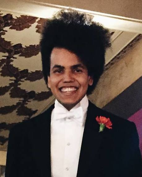 Dominik Feri